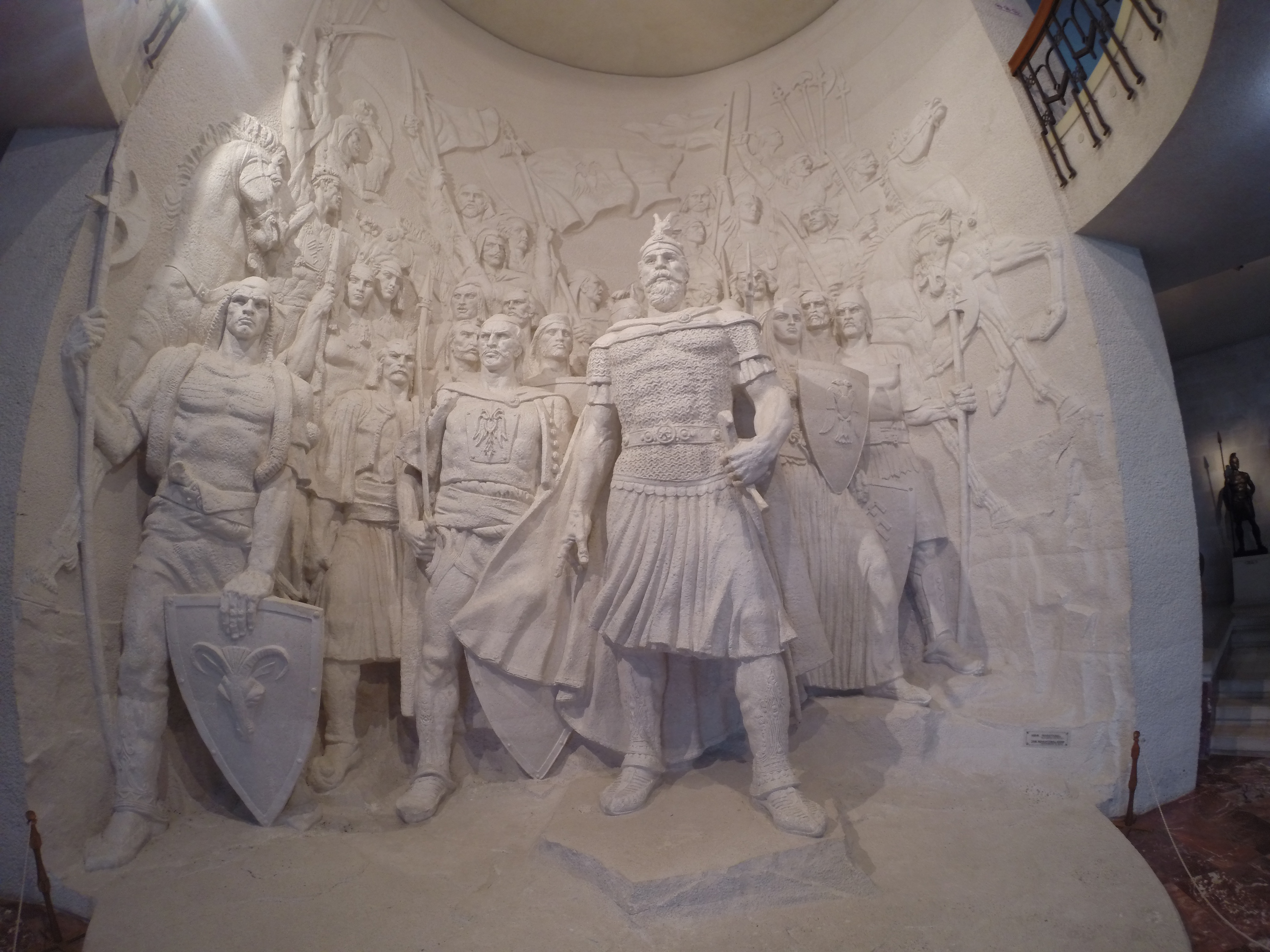 Kalaja e Krujes